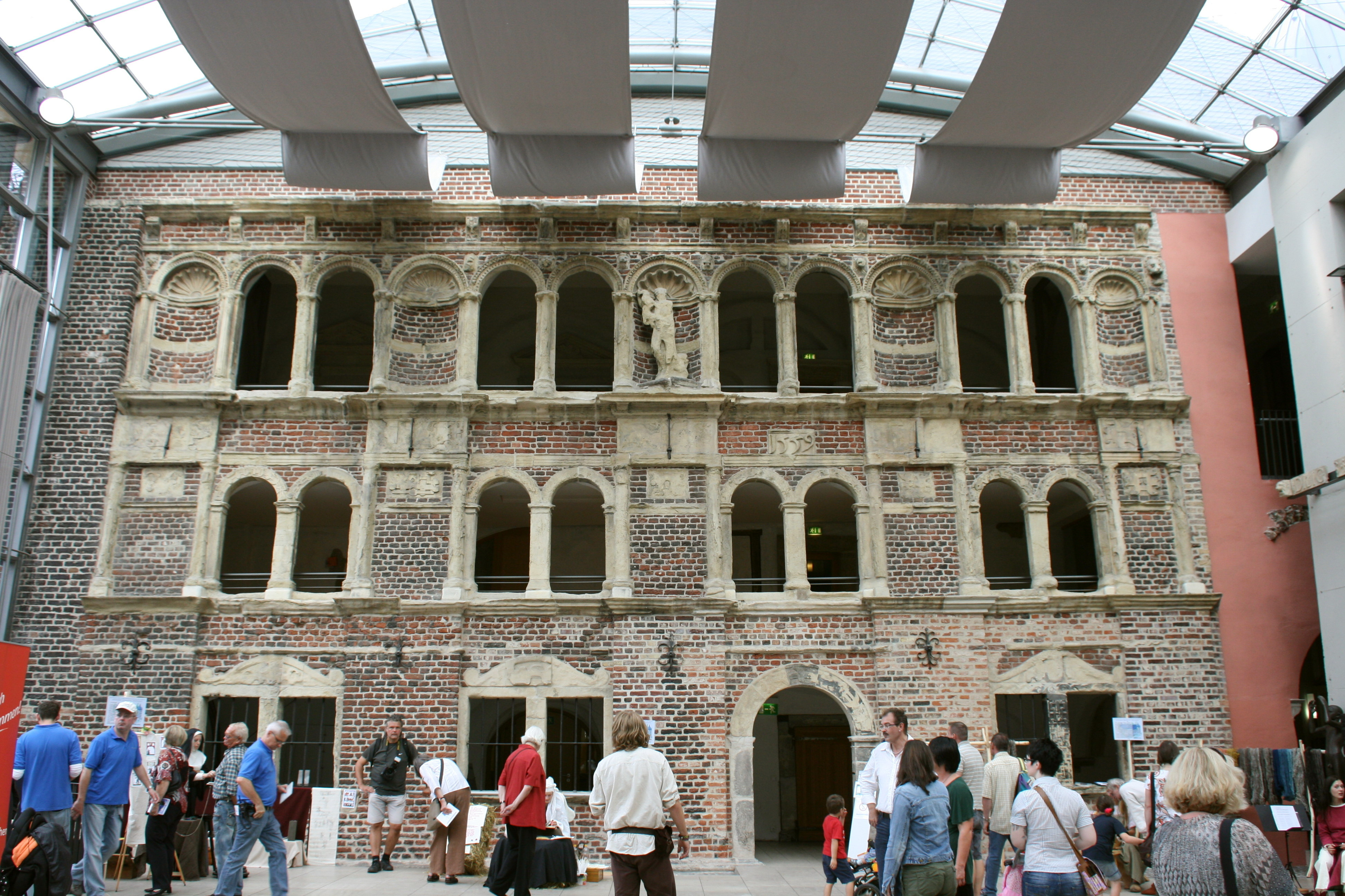 Gaudium.2010 am 22.08.2010 auf Schloss Horst in Gelsenkirchen-Horst